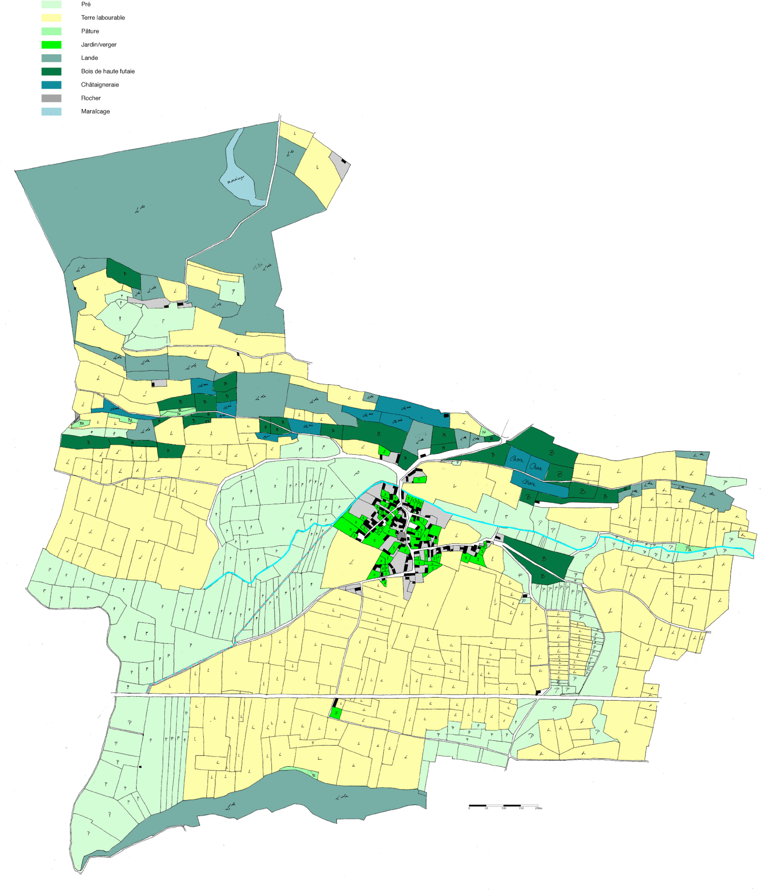 Photographie du plan cadastral napoléonien réalisé en 1809 et déposé en la mairie de Lézignan, Hautes-Pyrénées